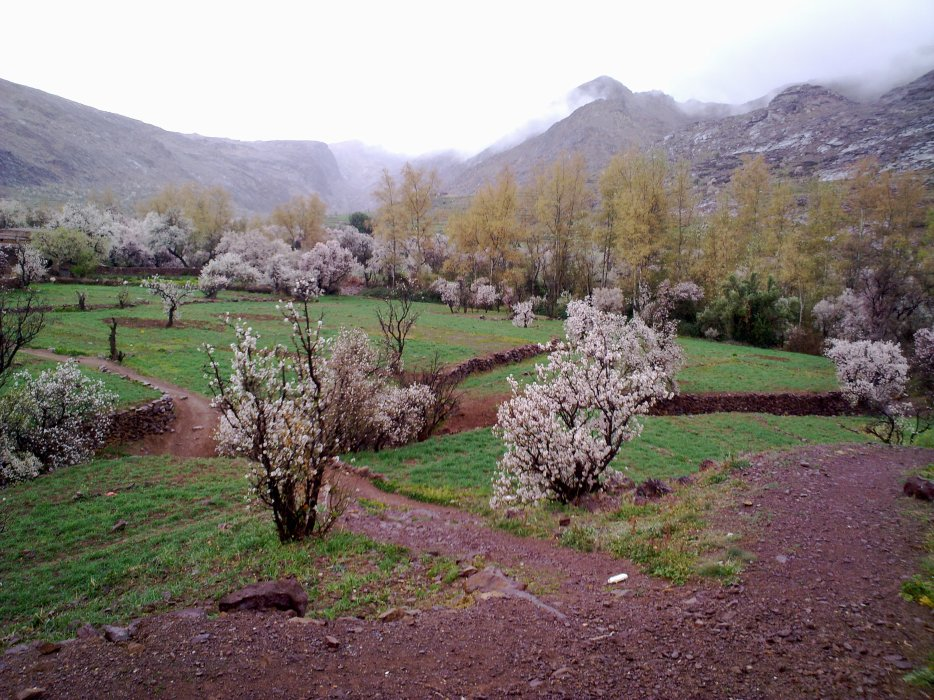 منظر عام لقرية إسلان